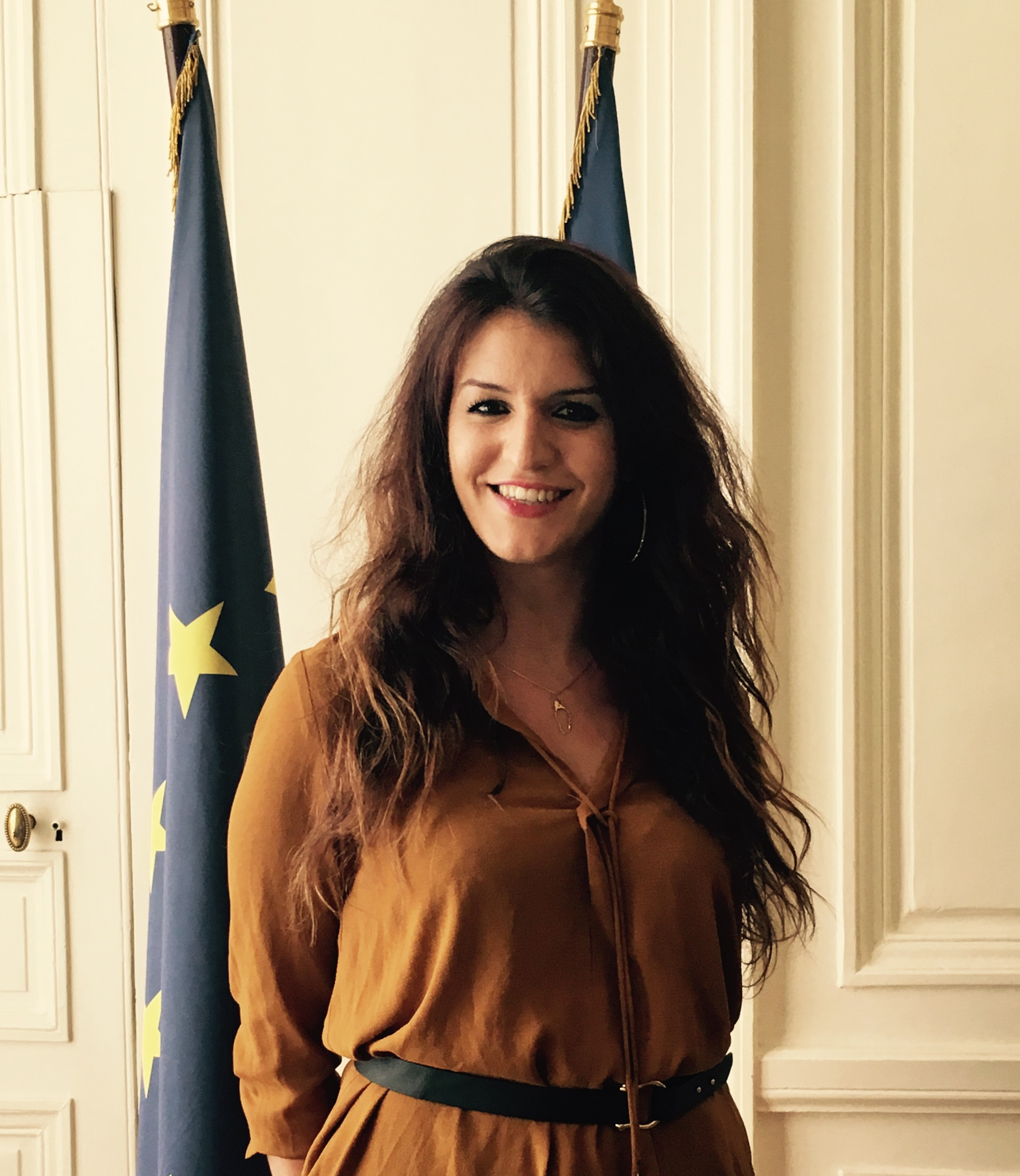 Marlène Schiappa, secrétaire d'Etat auprès du Premier ministre, chargée de l'égalité entre les femmes et les hommes